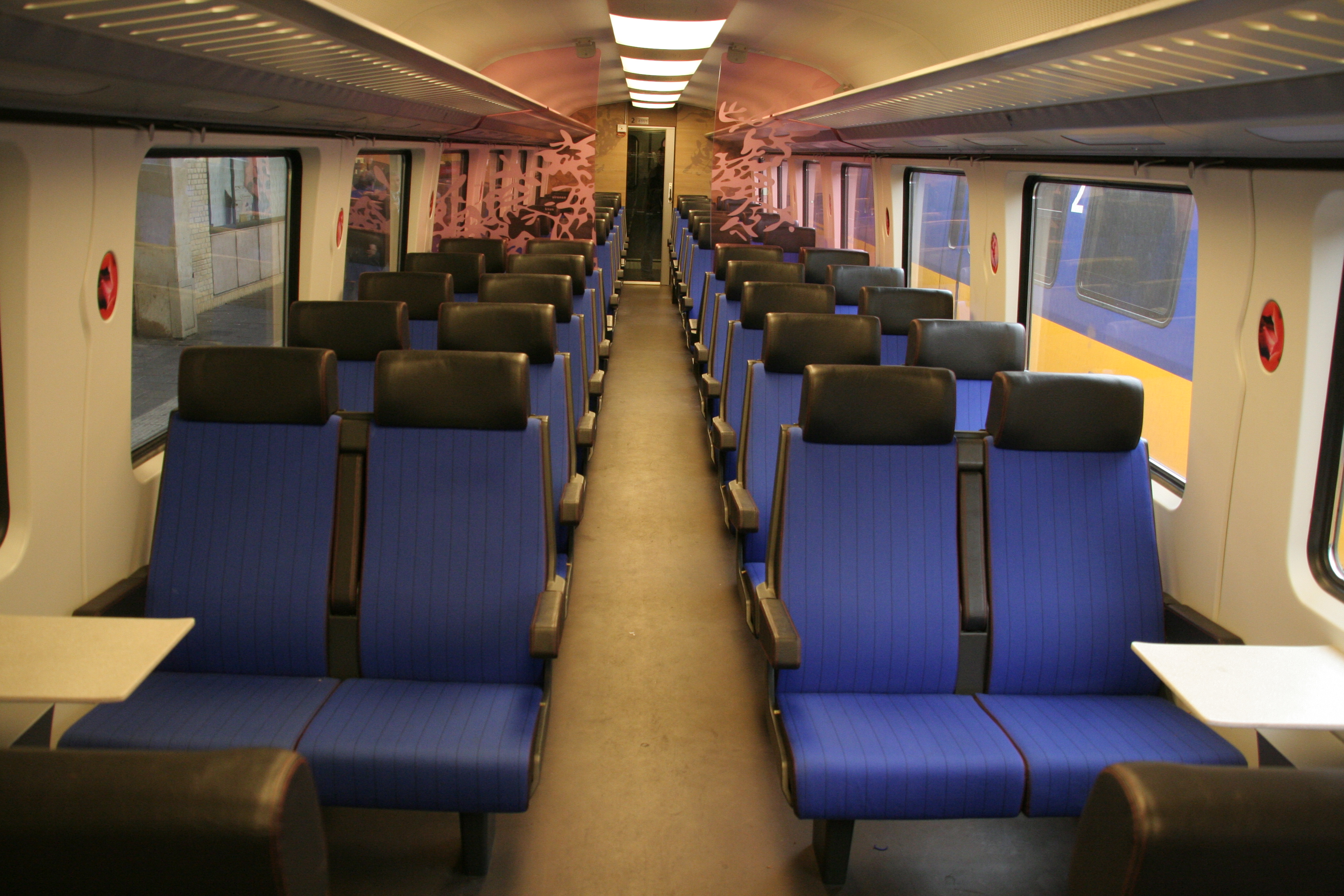 Interieur 2e klasse ICMm